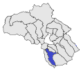 El terme d'Oceja dins de l'Alta Cerdanya, obtingut a partir d'un mapa de lliure disposició.